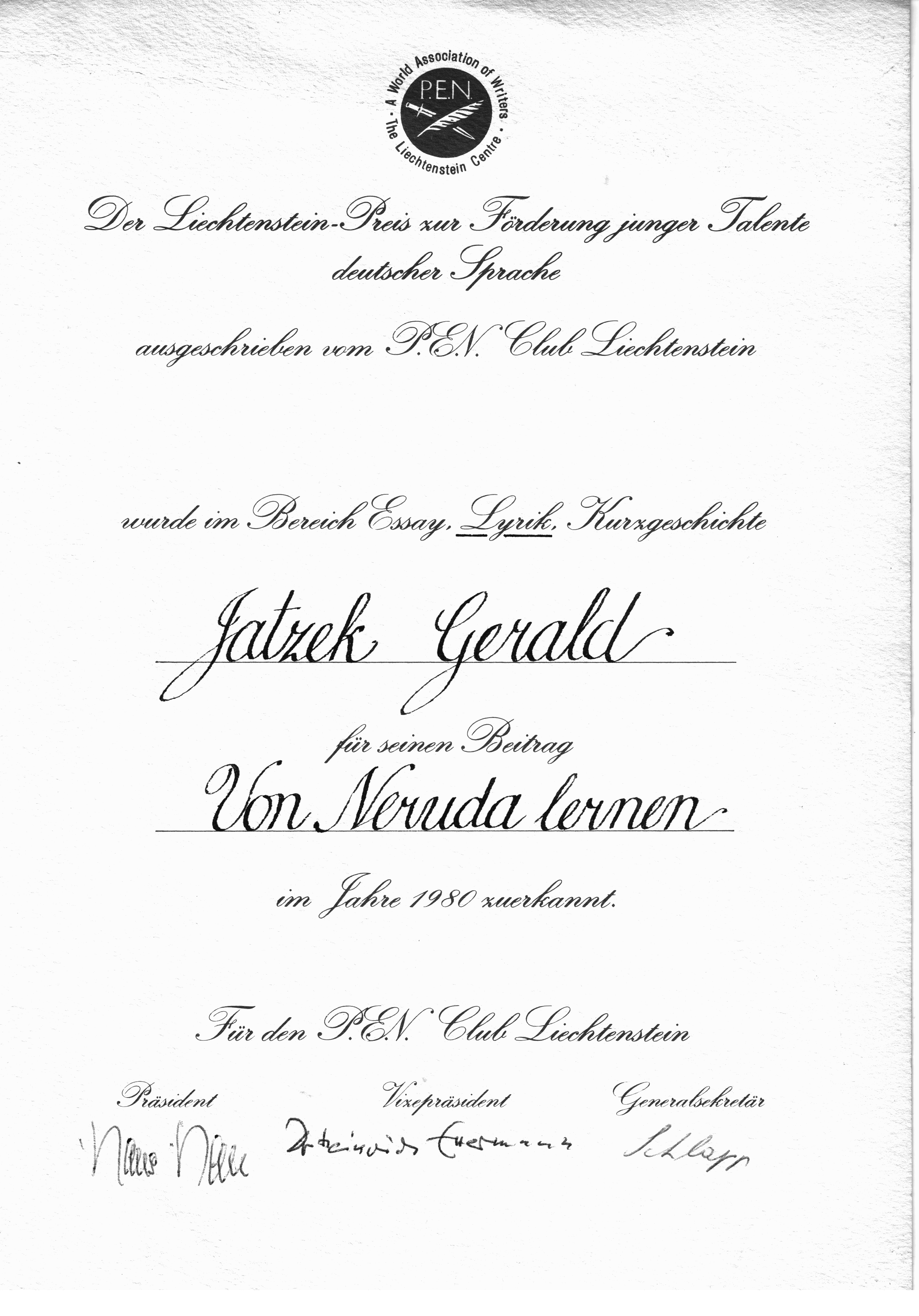 P.E.N.-Club Liechtenstein: Urkunde des Liechtenstein-Preises, der seit 1980 vergeben wird, für den Autor Gerald Jatzek.